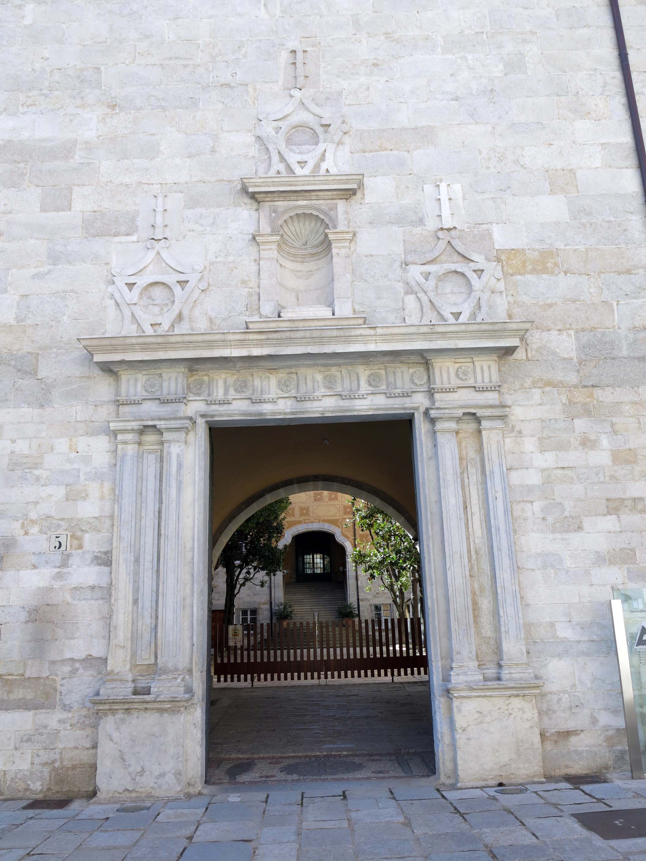 Hospital Provincial de Santa Caterina (Girona)